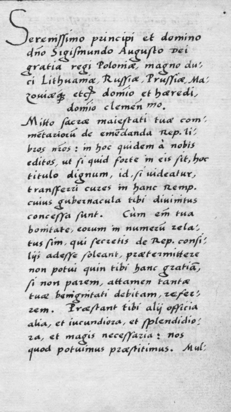 Rękopis Andrzeja Frycza Modrzewskiego, list autora do króla Zygmunta Augusta.